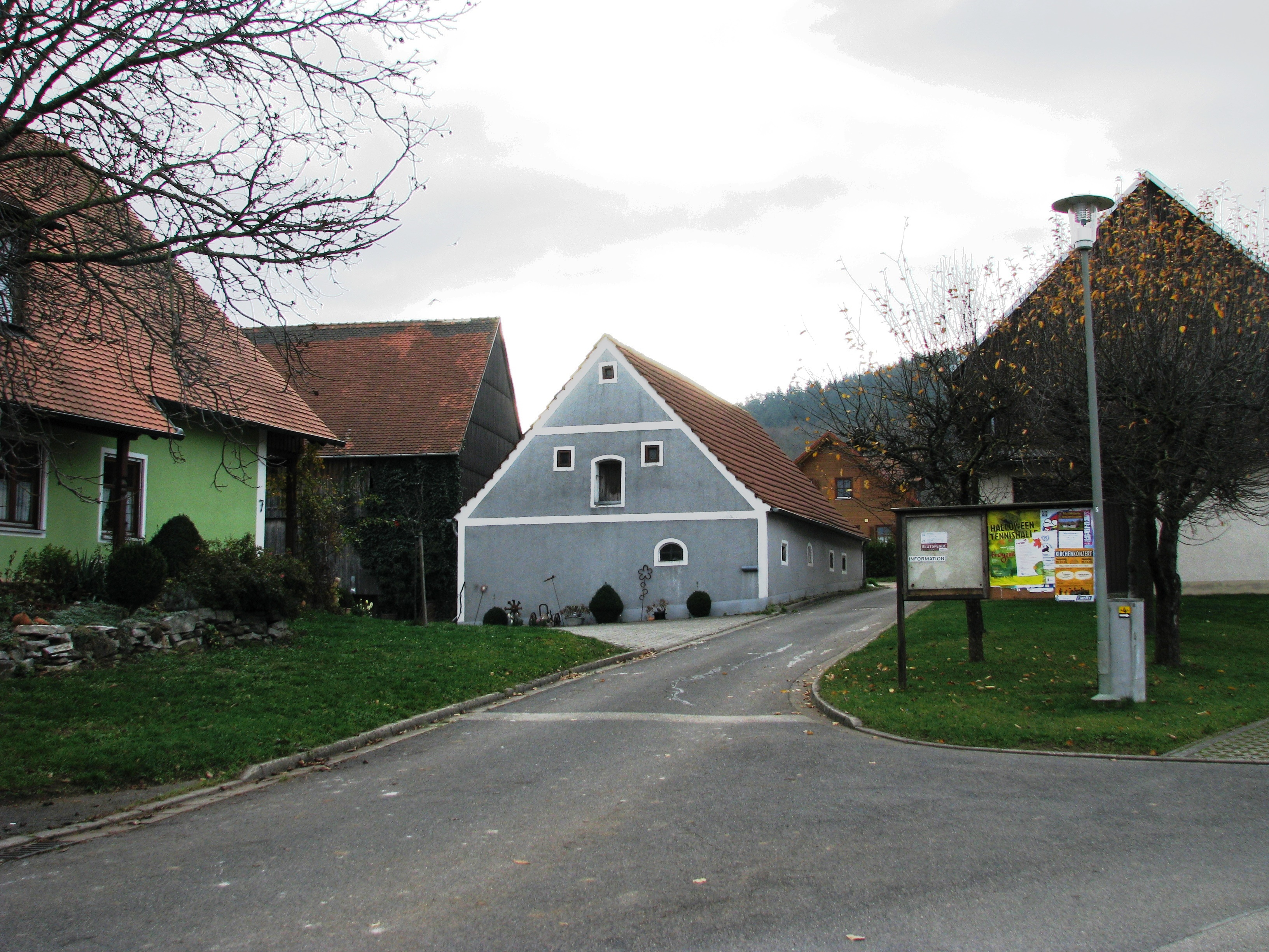 Kleinberghausen, Ortsteil der Stadt Freystadt im Landkreis Neumarkt in der Oberpfalz in Bayern, Dorfmitte